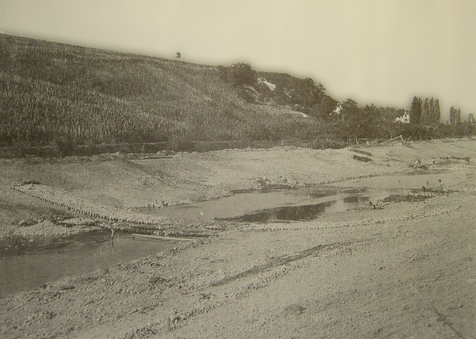 Die Wiese oberhalb der Weiler Brücke